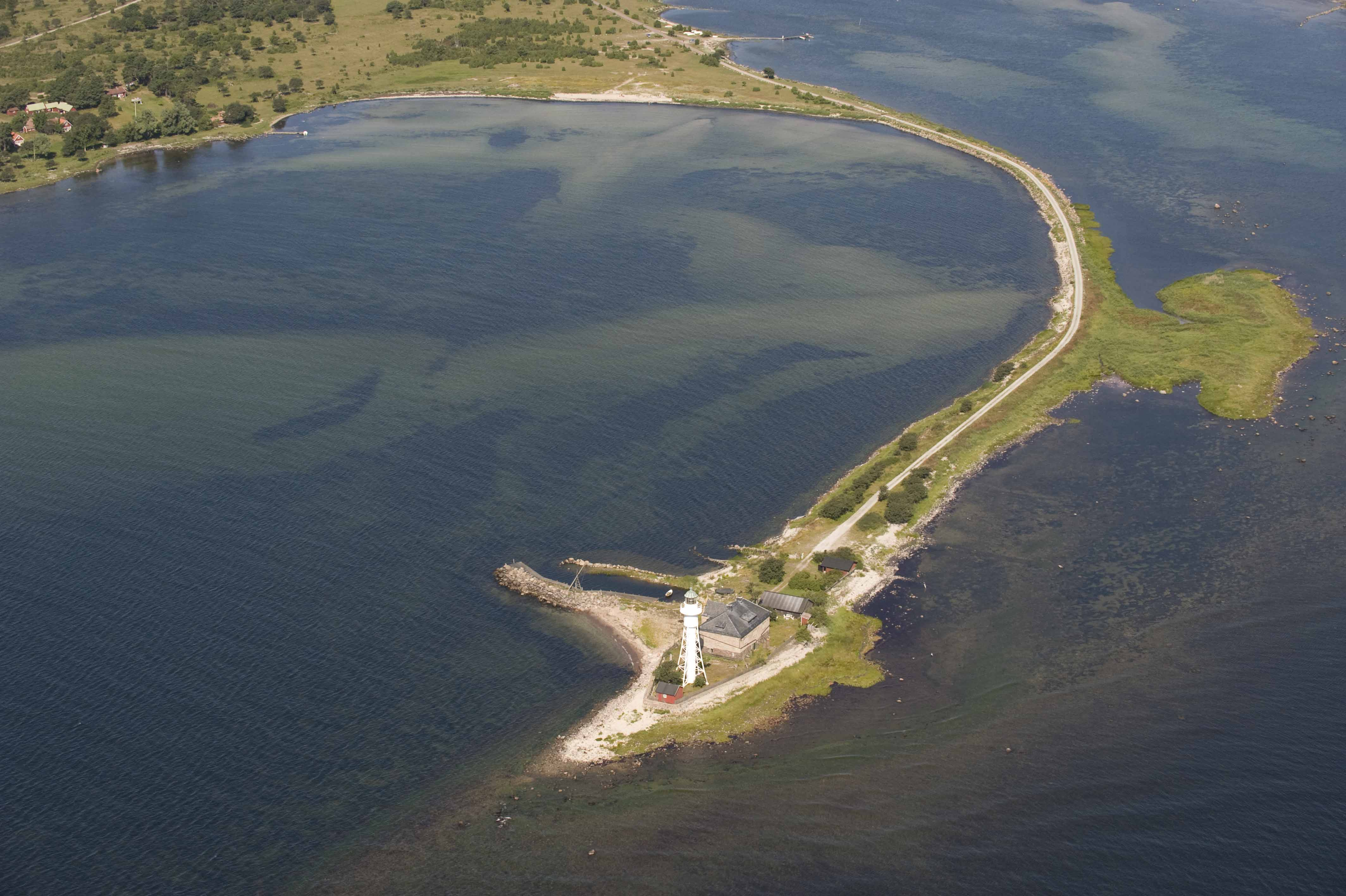 Högby fyr